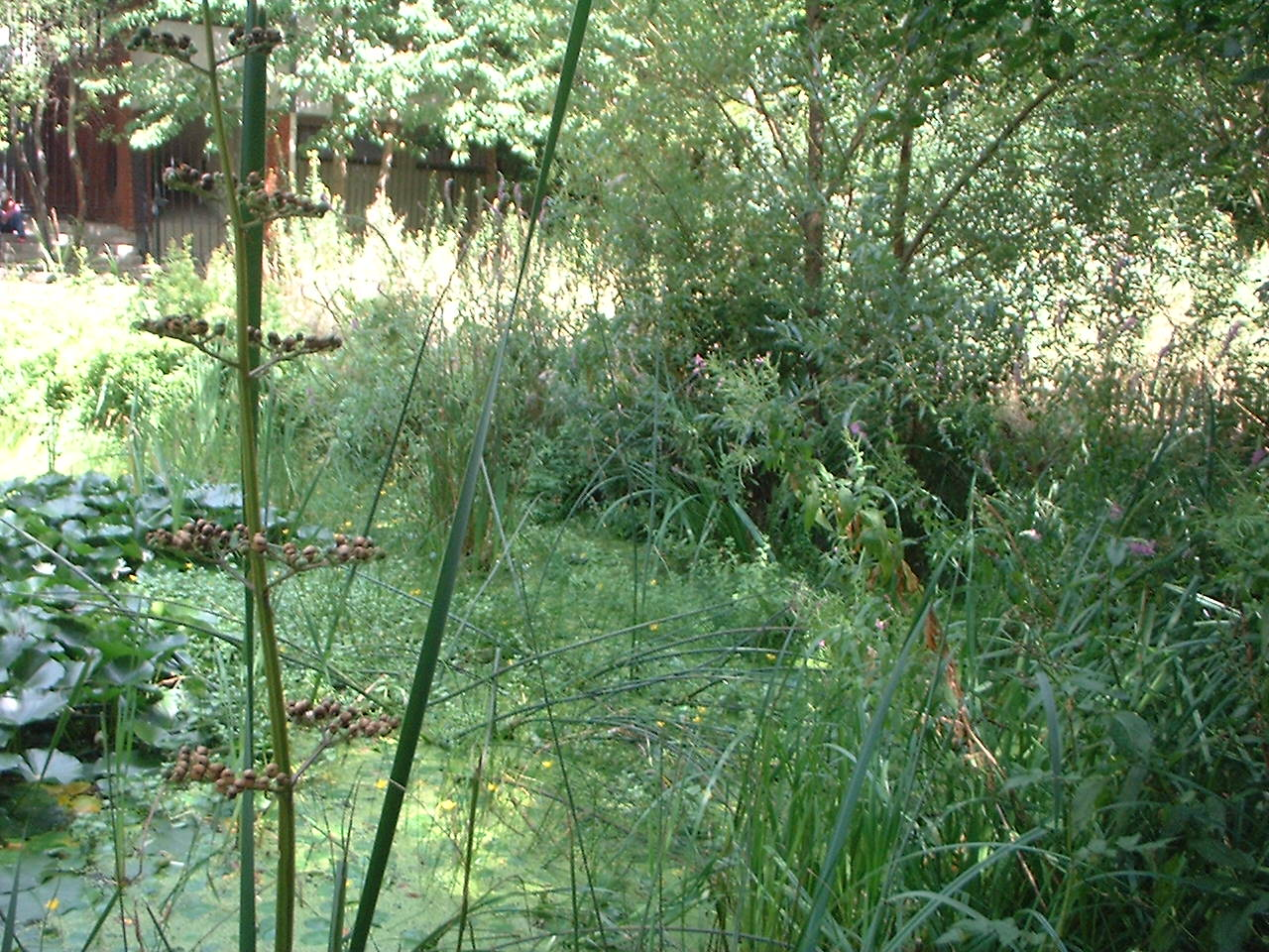 Jardin naturel à Paris XXe